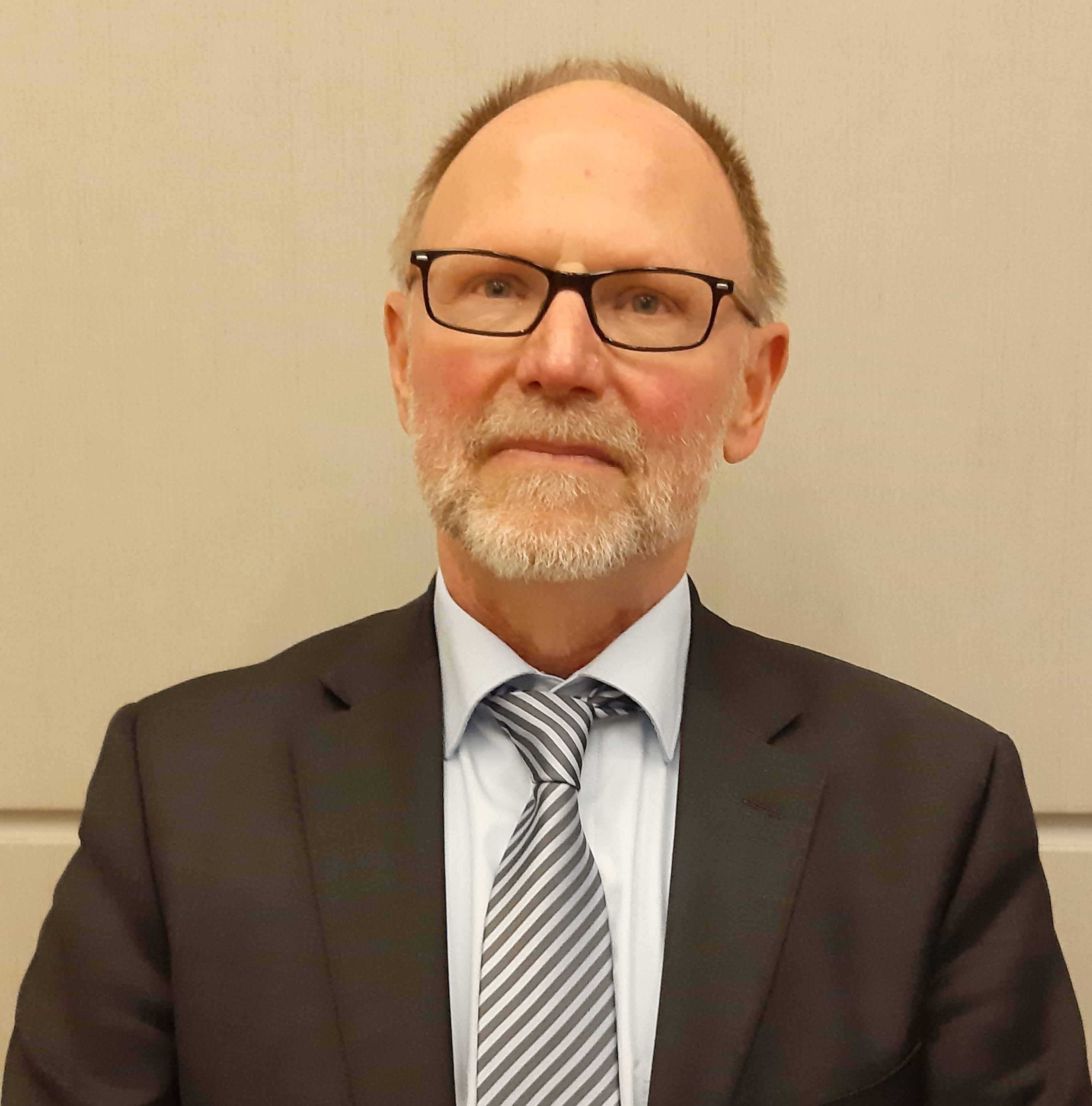 Leitender Ministerialrat Uwe Reichel-Offermann, Verfassungschutz NRW (Gruppenleiter 62), Fachtagung der LZPB NRW zu Extremismusprävention am 17. Juni 2019 in Düsseldorf